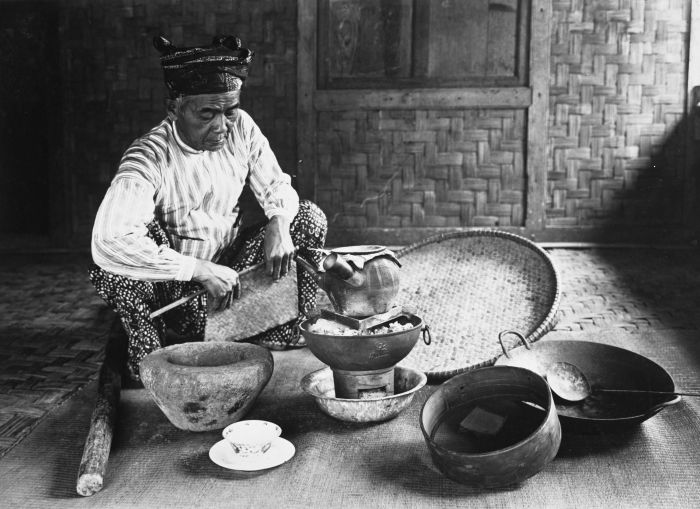 Foto. Een dukun tijdens de bereiding van zijn geneesmiddelen